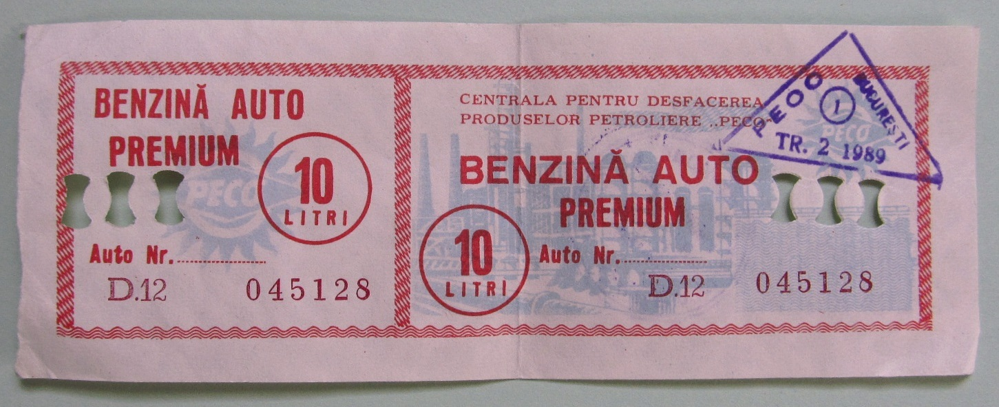 Benzinbon welchen Auslandstouristen in Rumänen in den 1980er Jahren für Devisen bekamen.